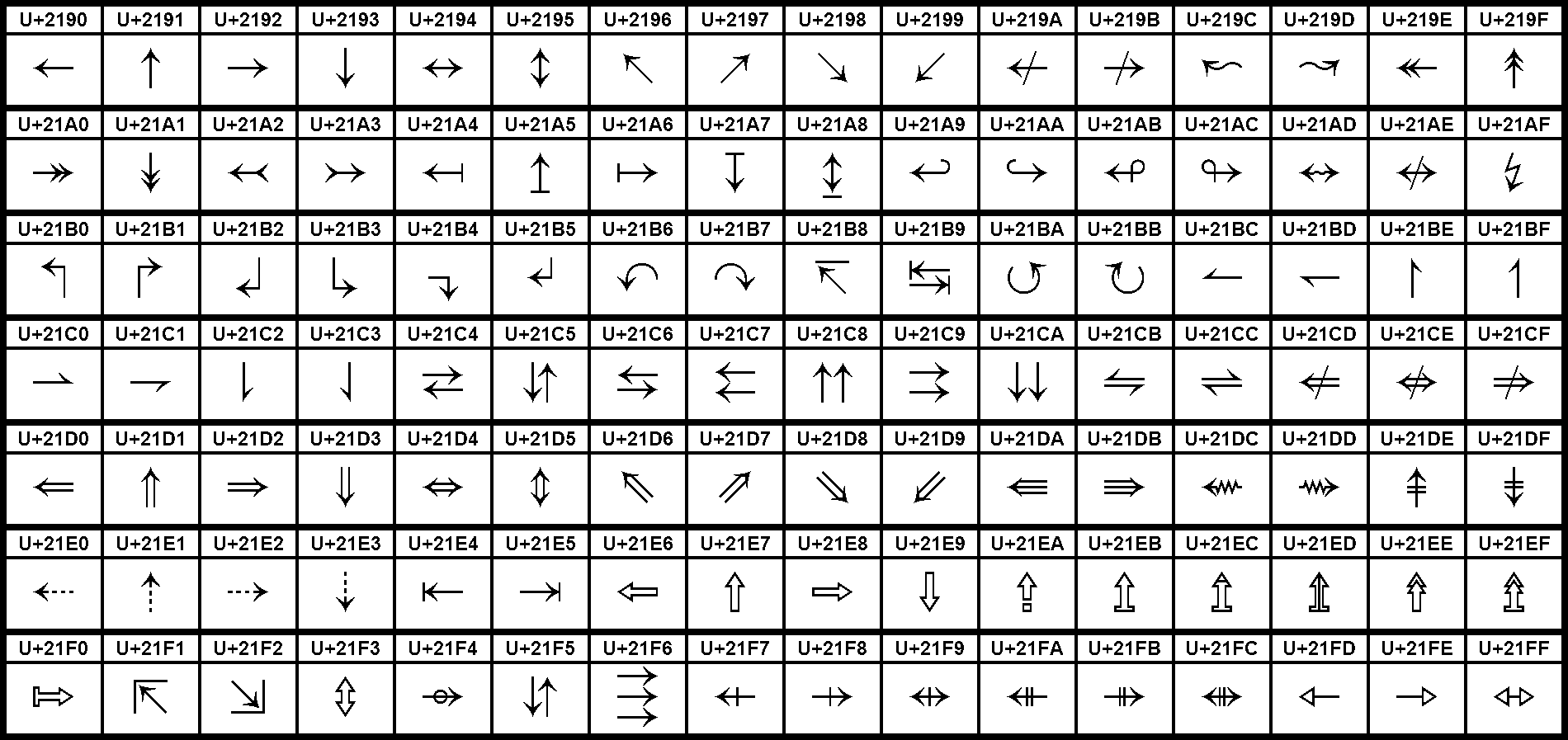 Grafiktafel des Unicodeblocks "Pfeile".